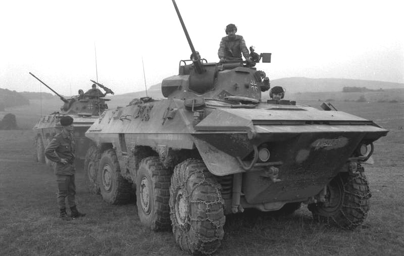 23.9.1986 Mitarbeiter des Bundespresseamtes beobachten das Herbstmanöver "Fränkischer Schild" der Bundeswehr- mit Beteiligung zahlreicher Soldaten aus NATO-Mitgliederstaaten sowie eines französichen Großverbandes - im Raum Würzburg.